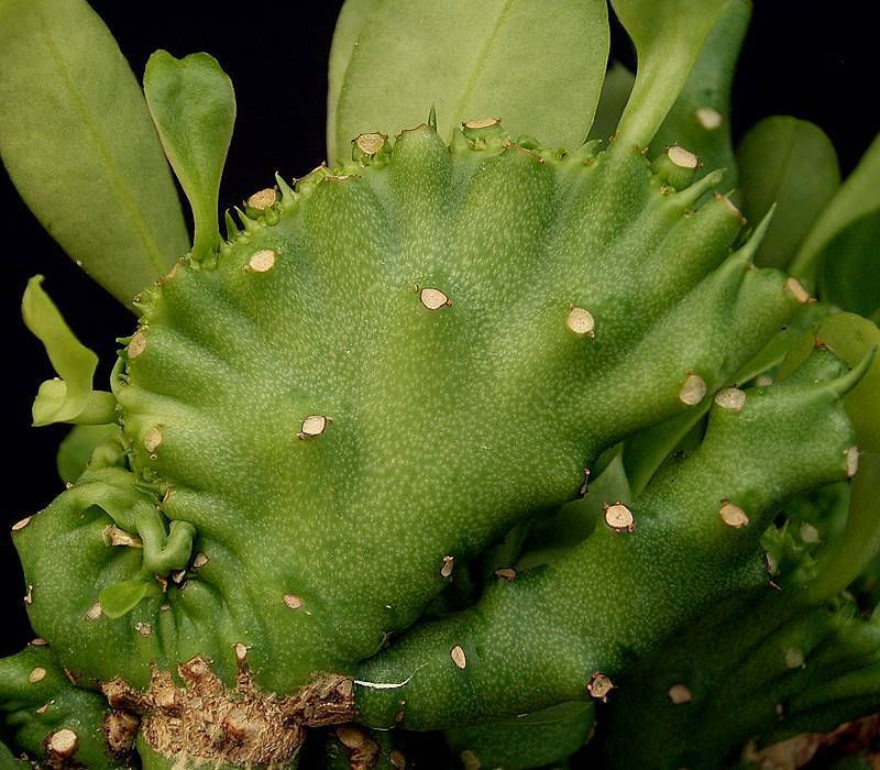 Euphorbia neriifolia fa. cristata